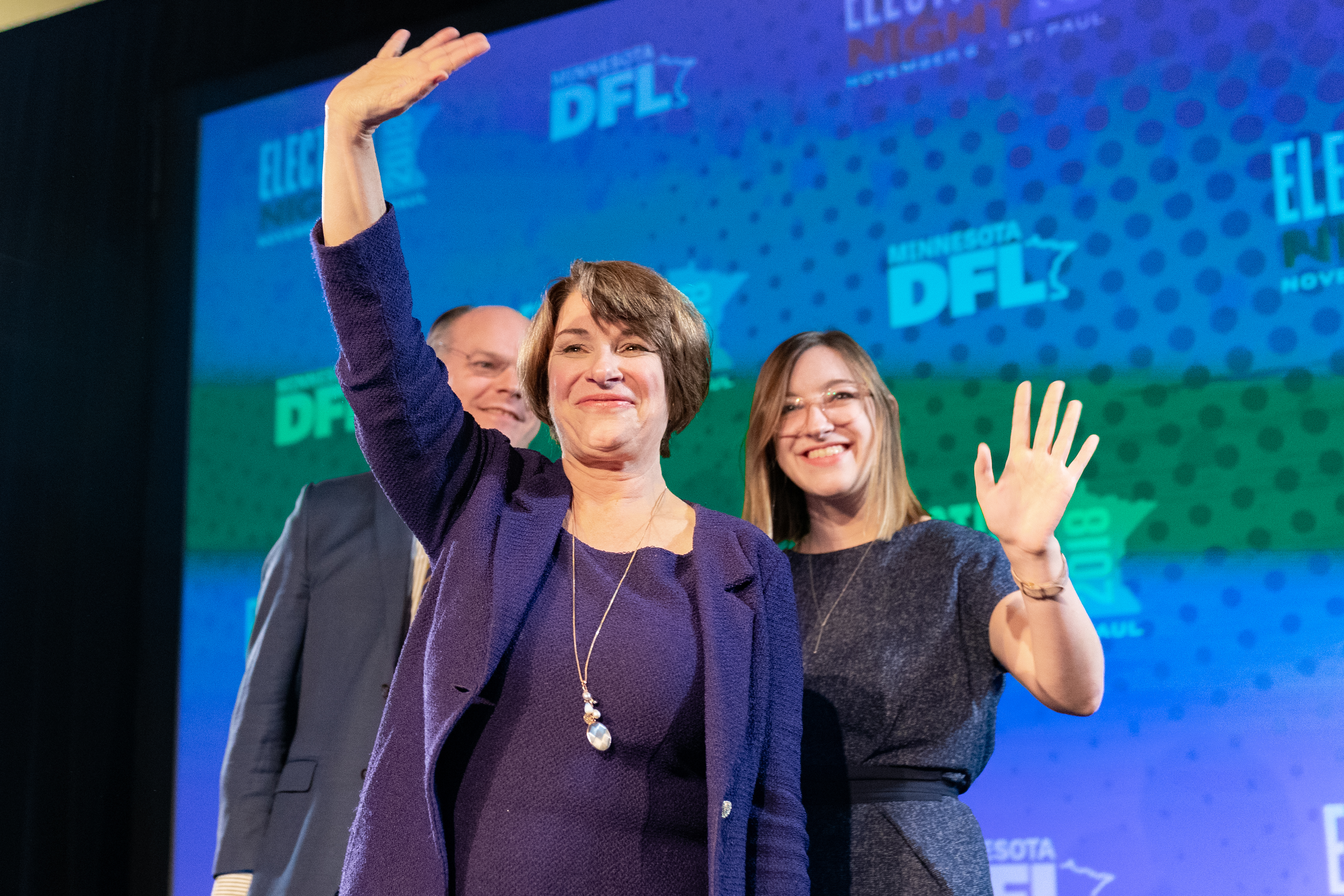 Klobuchar's husband, John Bessler, and daughter, Abigail Klobuchar Bessler, stand behind her.